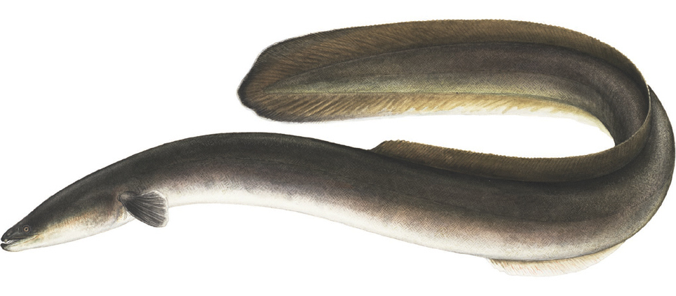 Anguilla rostrata